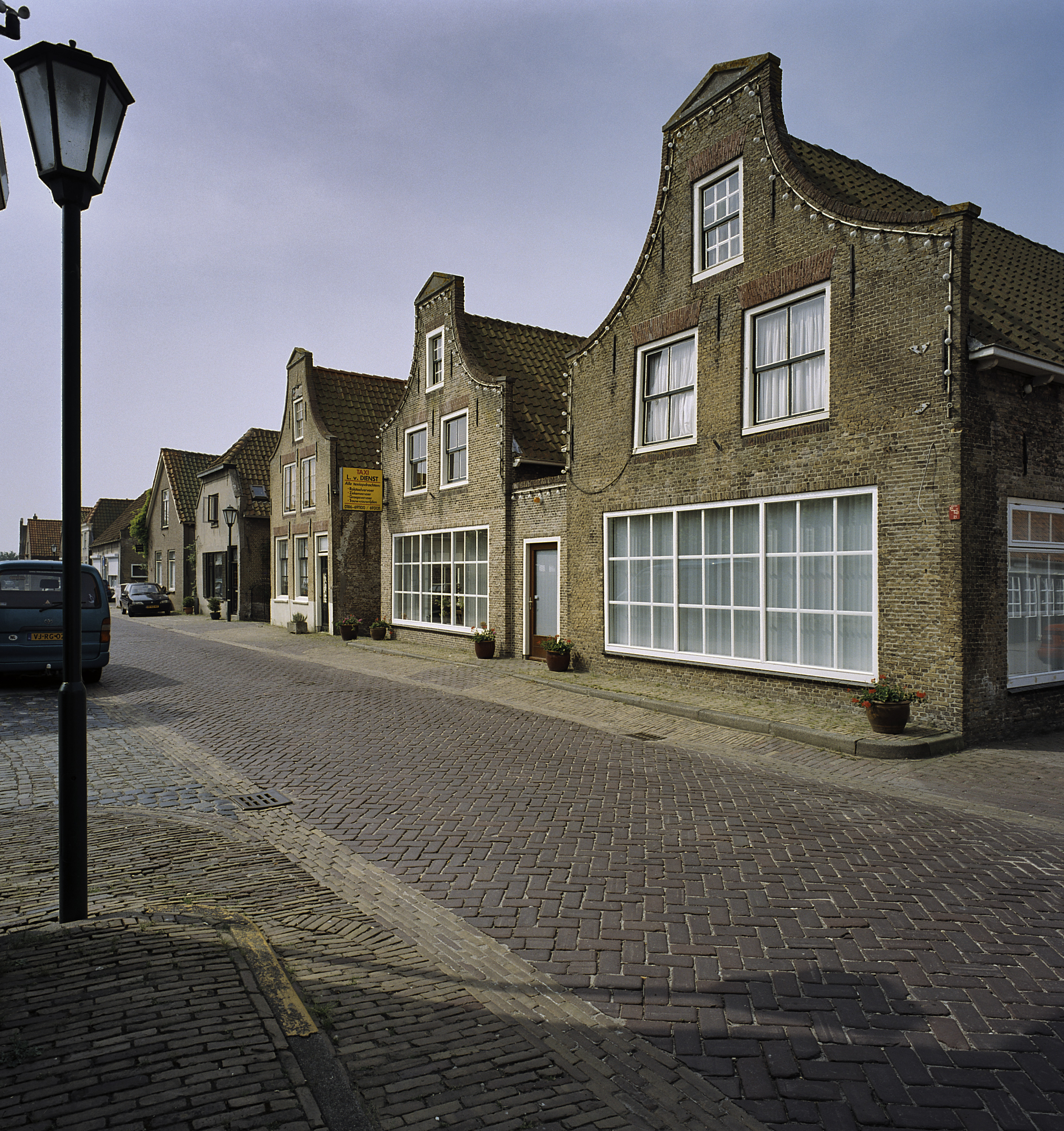 Klokgevel: Overzicht voorgevels (opmerking: Gefotografeerd voor Monumenten In Nederland Zuid-Holland)